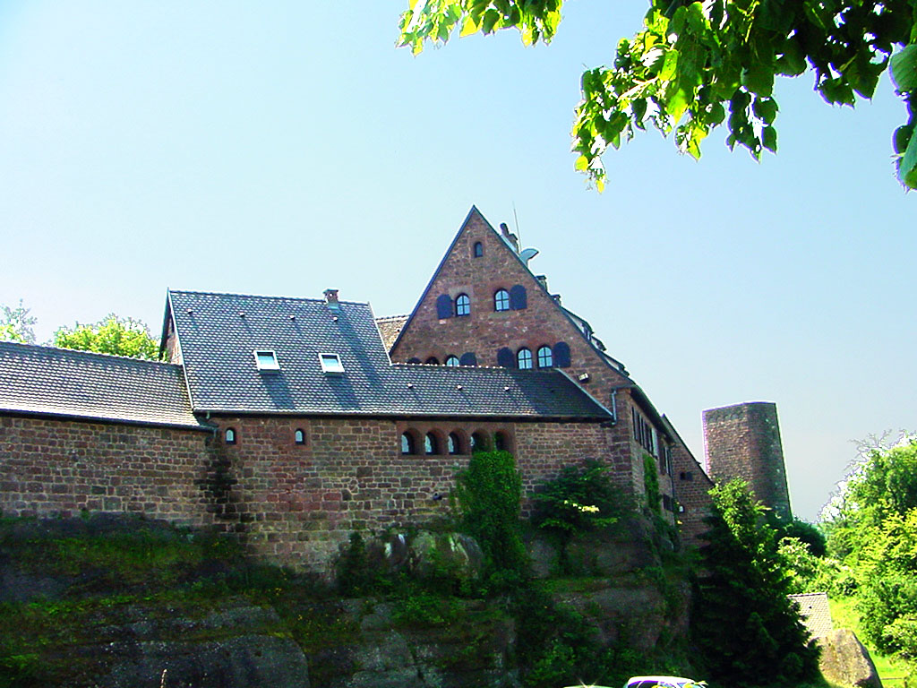 Vue du centre de vacances installé au château de Hunebourg et restes du Donjon. Cliché pris le 13 juin 2006 par Hubert Laroche.